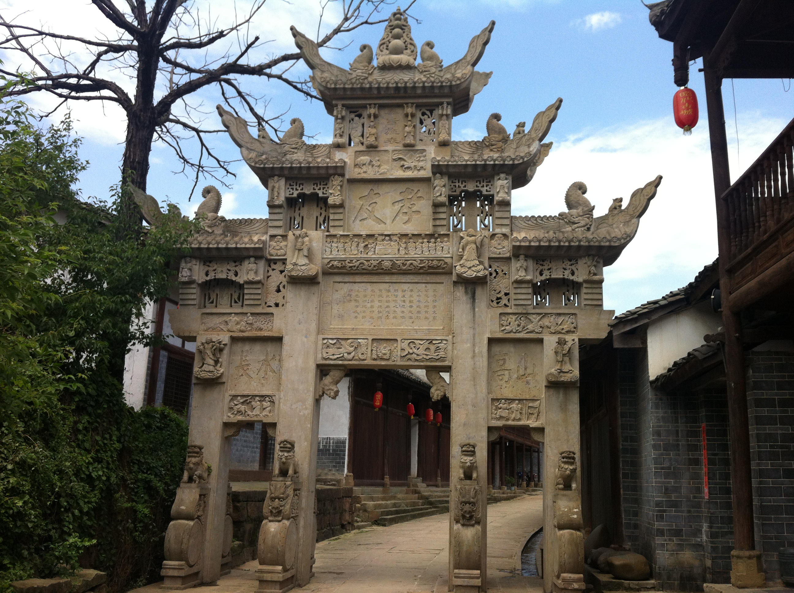 孝友牌坊（山高水長）